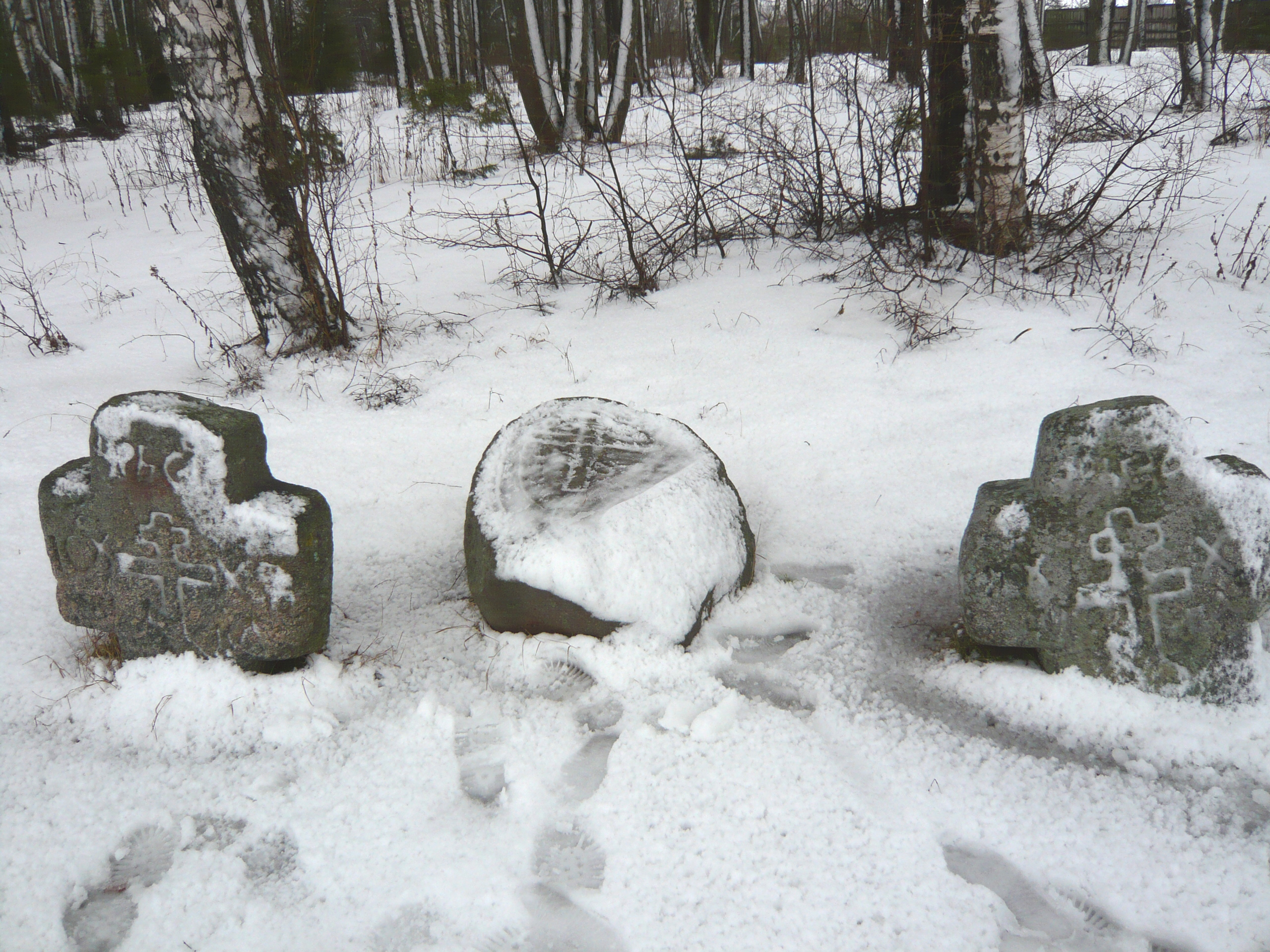 Василёво. Камни-валуны с крестами XI века из села Пречистая Каменка Кувшиновского района Тверской области